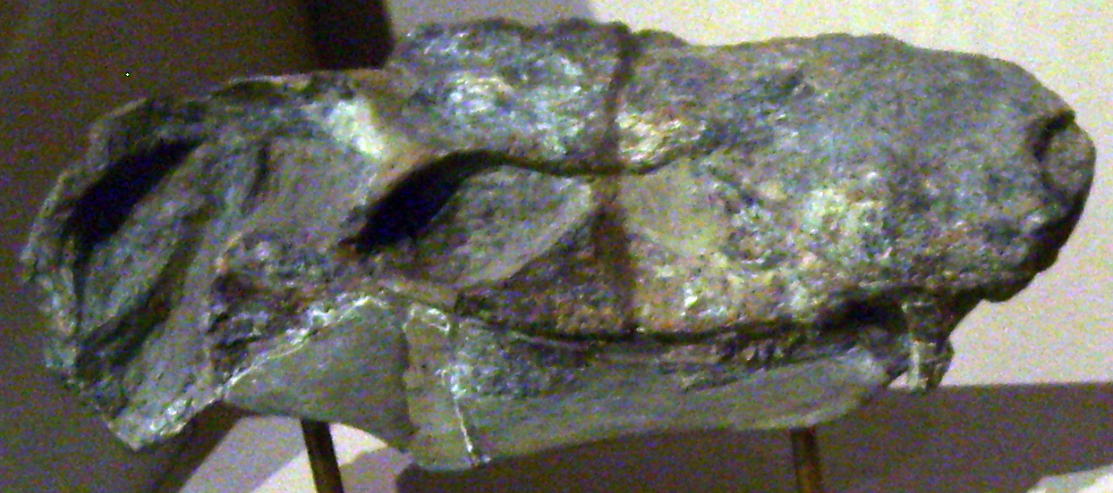 Pristerognathus minor skull at the Museum für Naturkunde, Berlin.